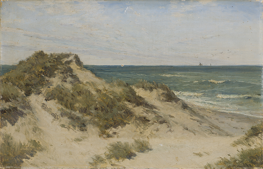 Klitter ved Nordstranden nær Højen. August 1911